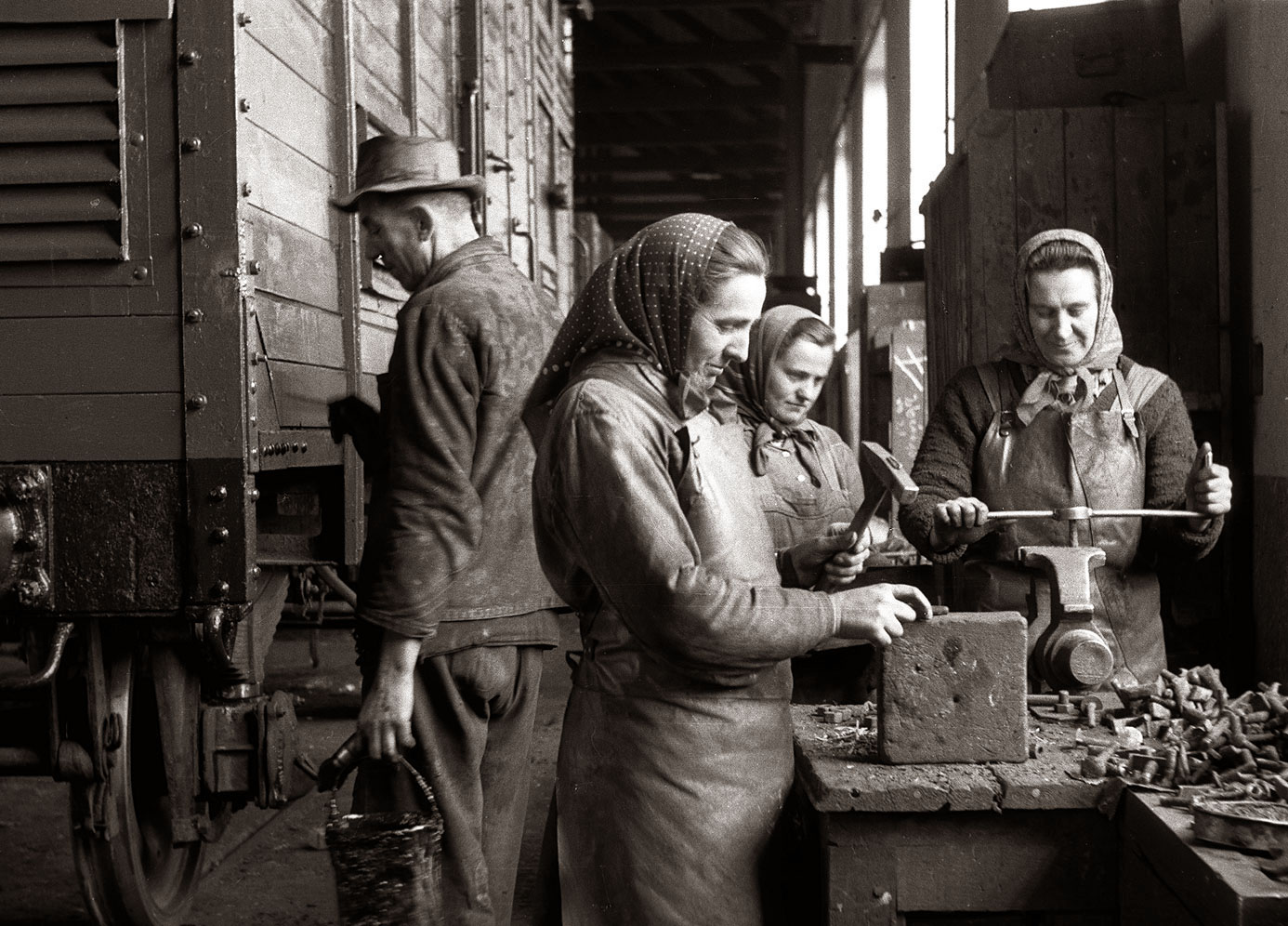 Podjetje za popravljanje vozil Jugoslovanskih železnic na Ptuju